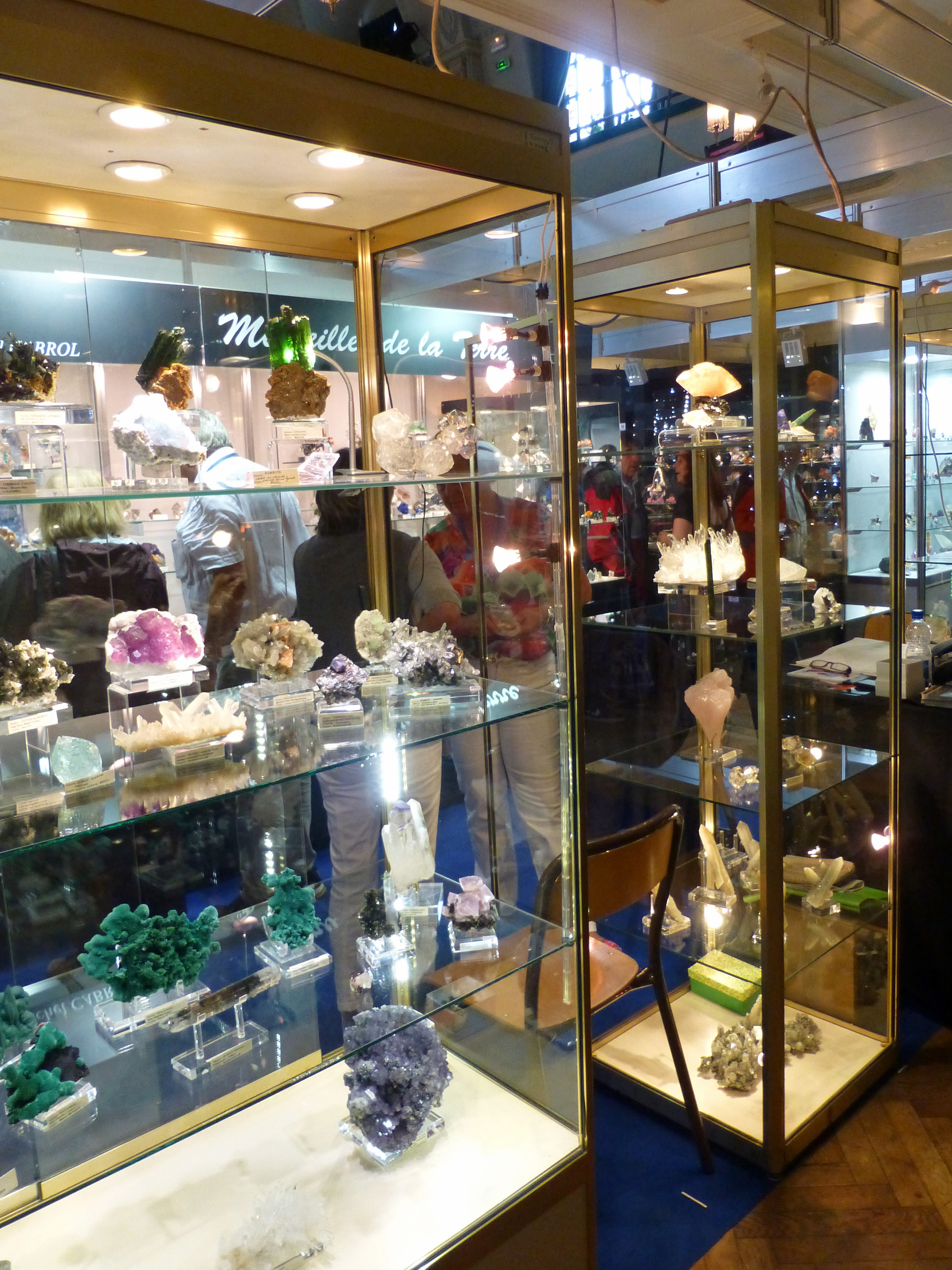 Sainte-Marie-aux-Mines (Haut-Rhin) : exposition internationale Mineral & Gem 2014